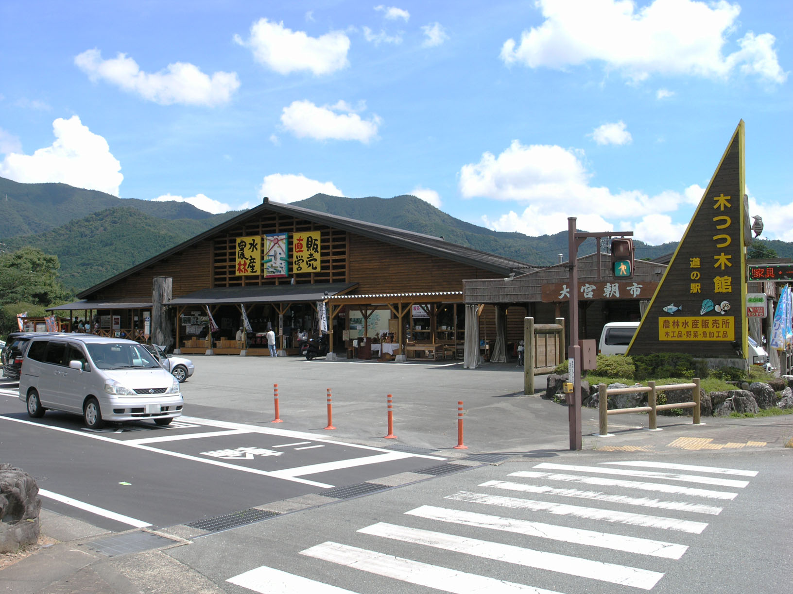 道の駅奥伊勢木つつ木館 2008年8月撮影。 機材：C8080WZ 撮影者：Kansai explorer 撮影後レタッチ・リサイズ